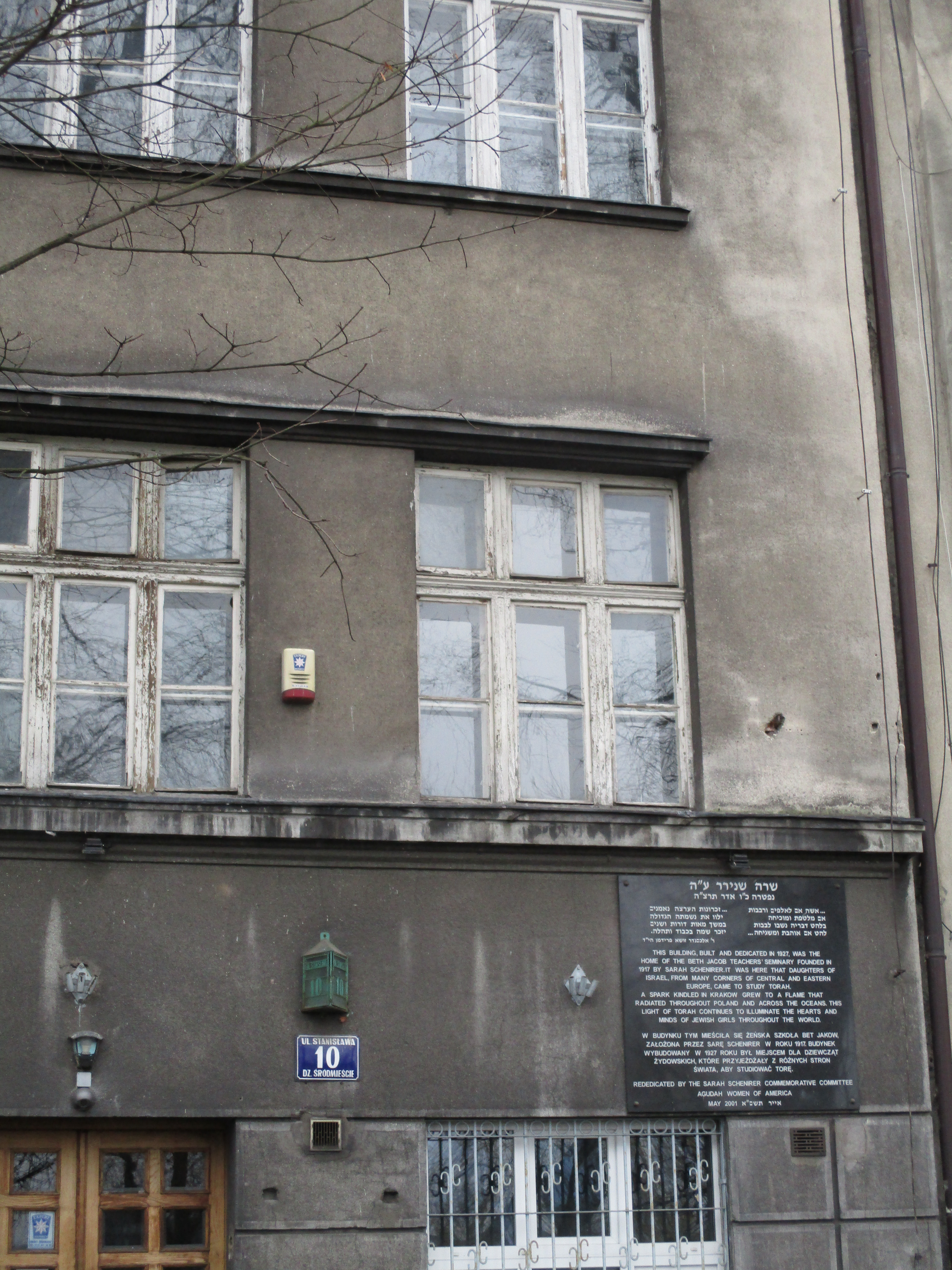 בית ספר "בית יעקב" הראשון, קרקוב (2).jpg